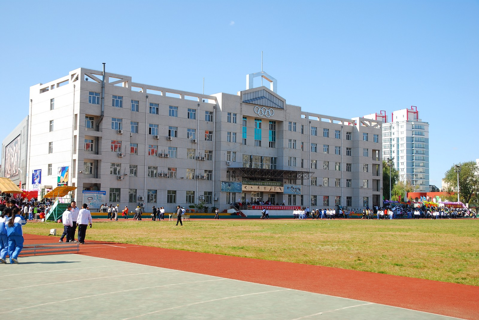 哈尔滨体育学院体育场